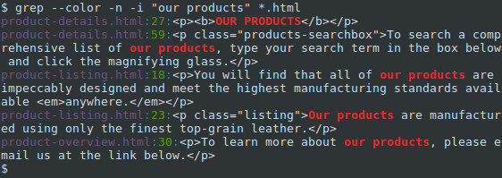 Монгол: грэп командын тухай зураг